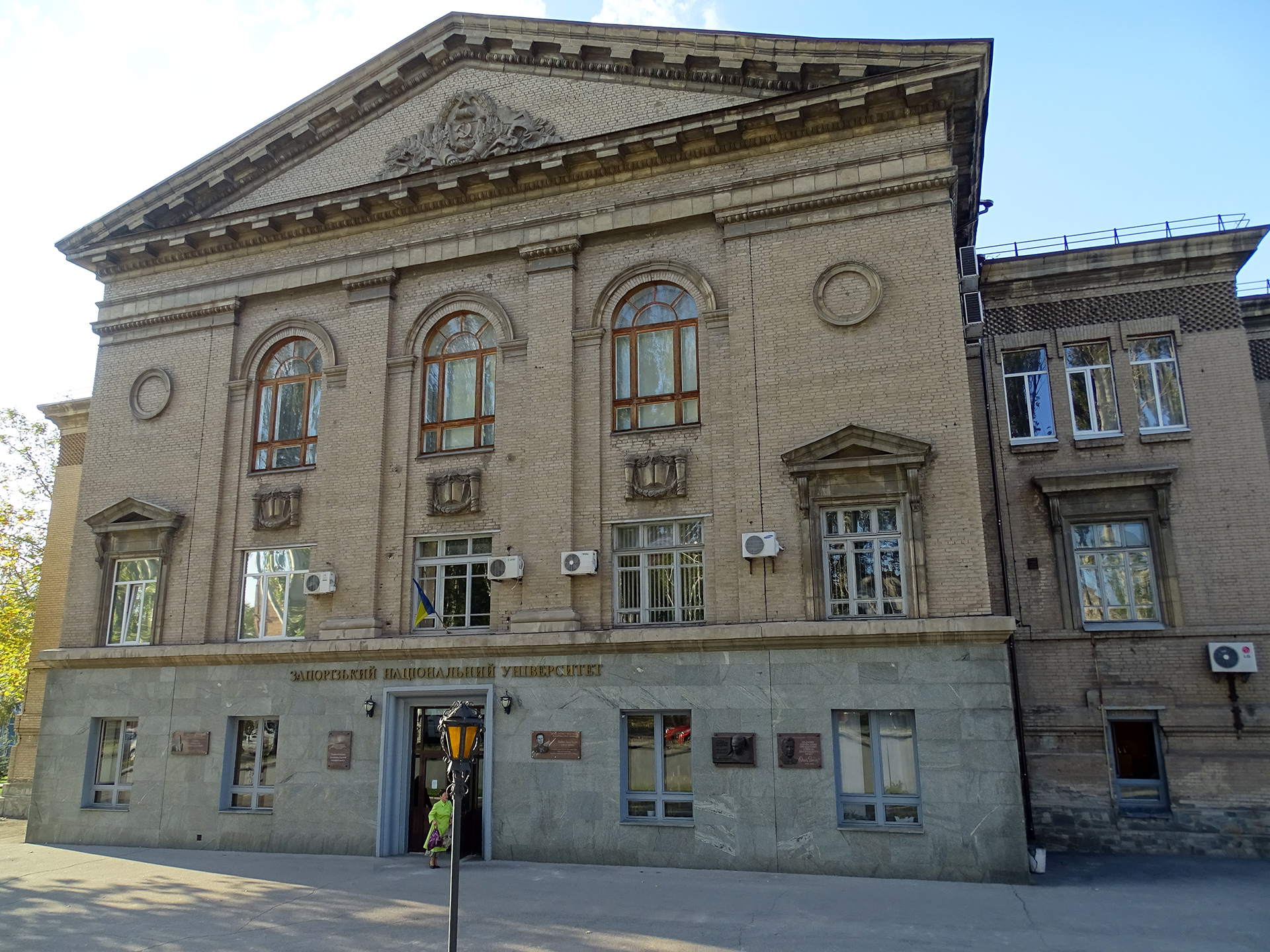 Будинок чоловічої гімназії, Запоріжжя, вул. Жуковського, 66